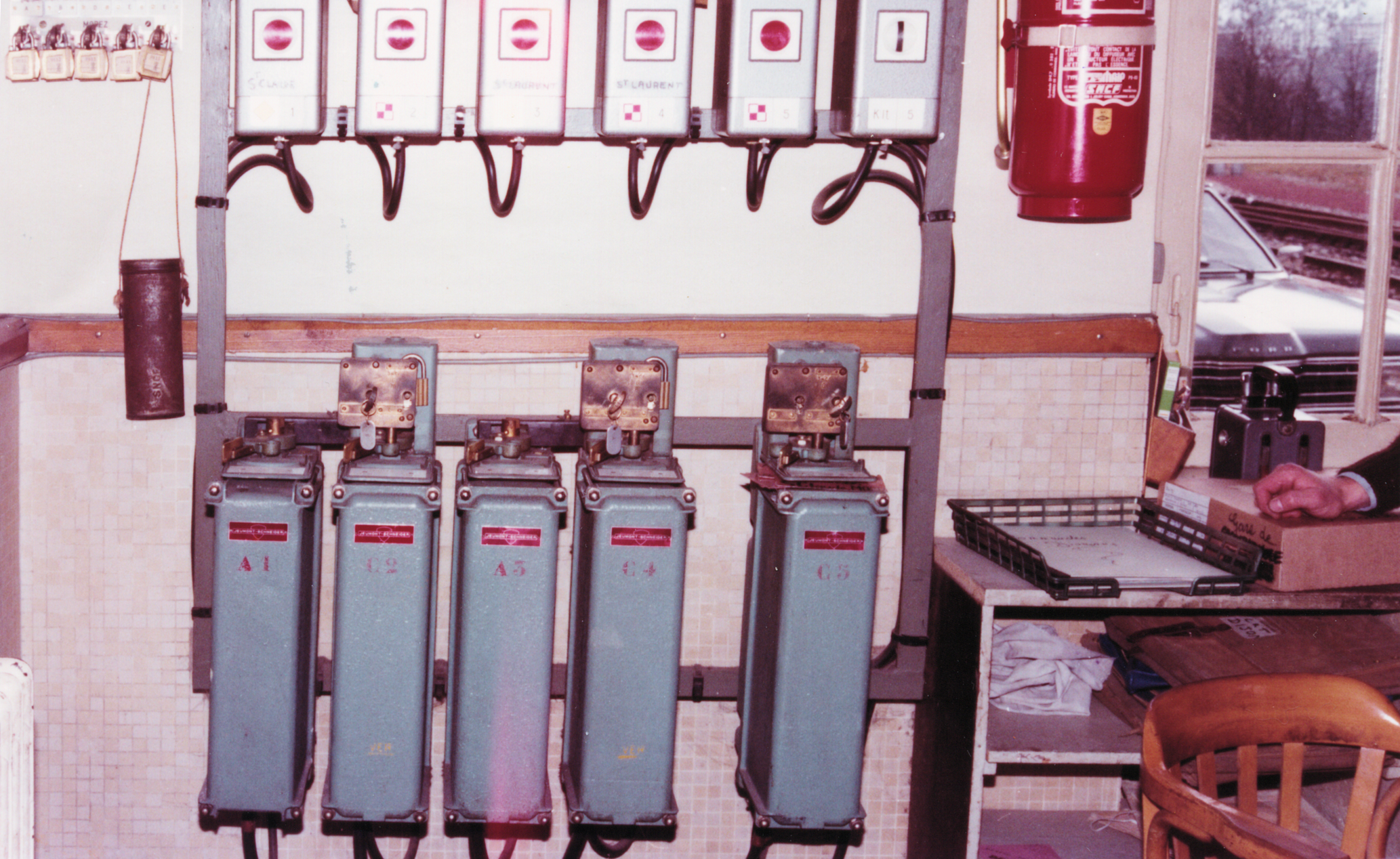 France - Gare de Morez en 1982 - Verrous Commutateurs à manettes